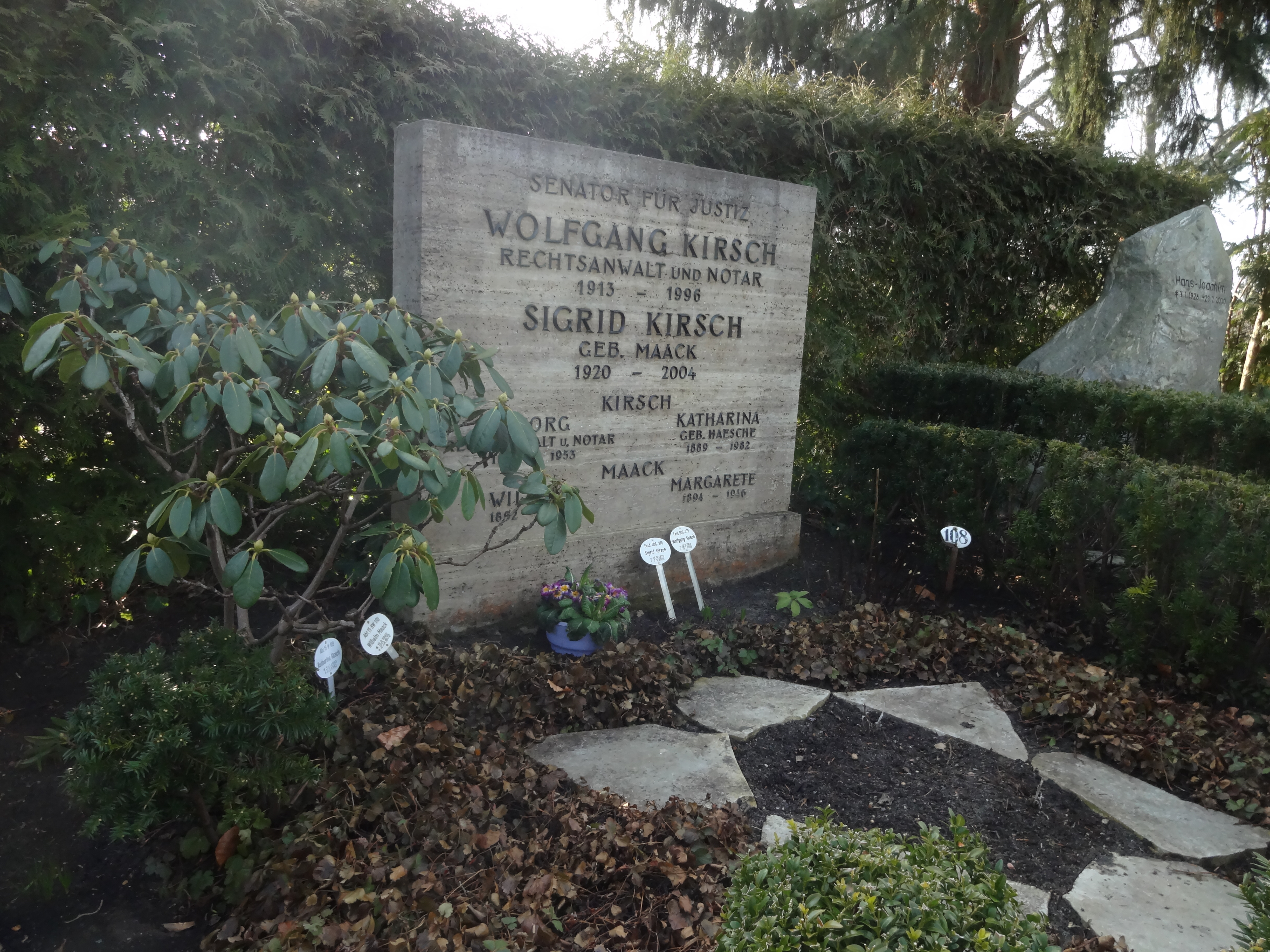 Grab von dem Wolfgang Kirsch auf dem Friedhof Zehlendorf in Berlin